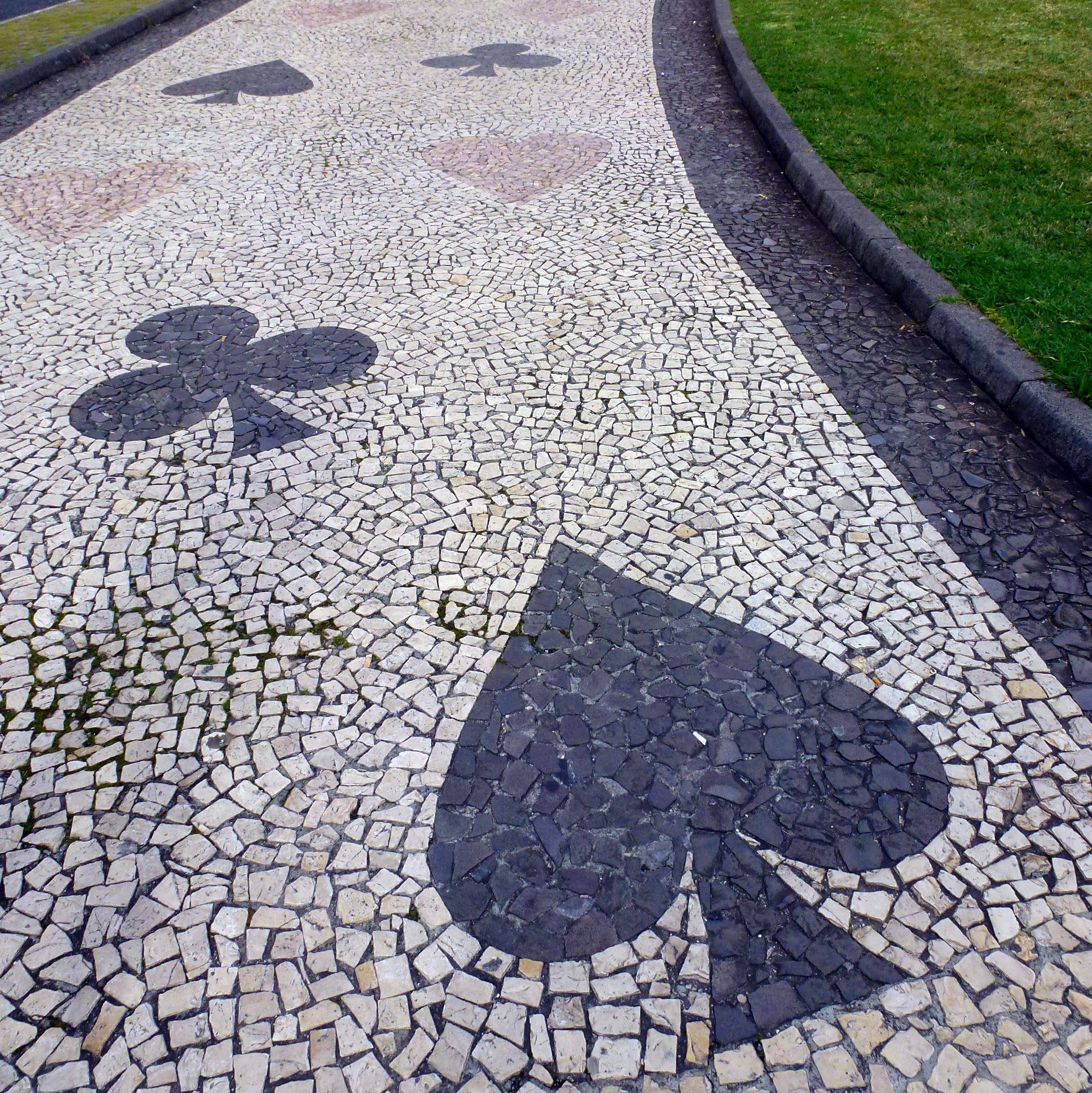 Casino, Funchal, Madeira, Portugal